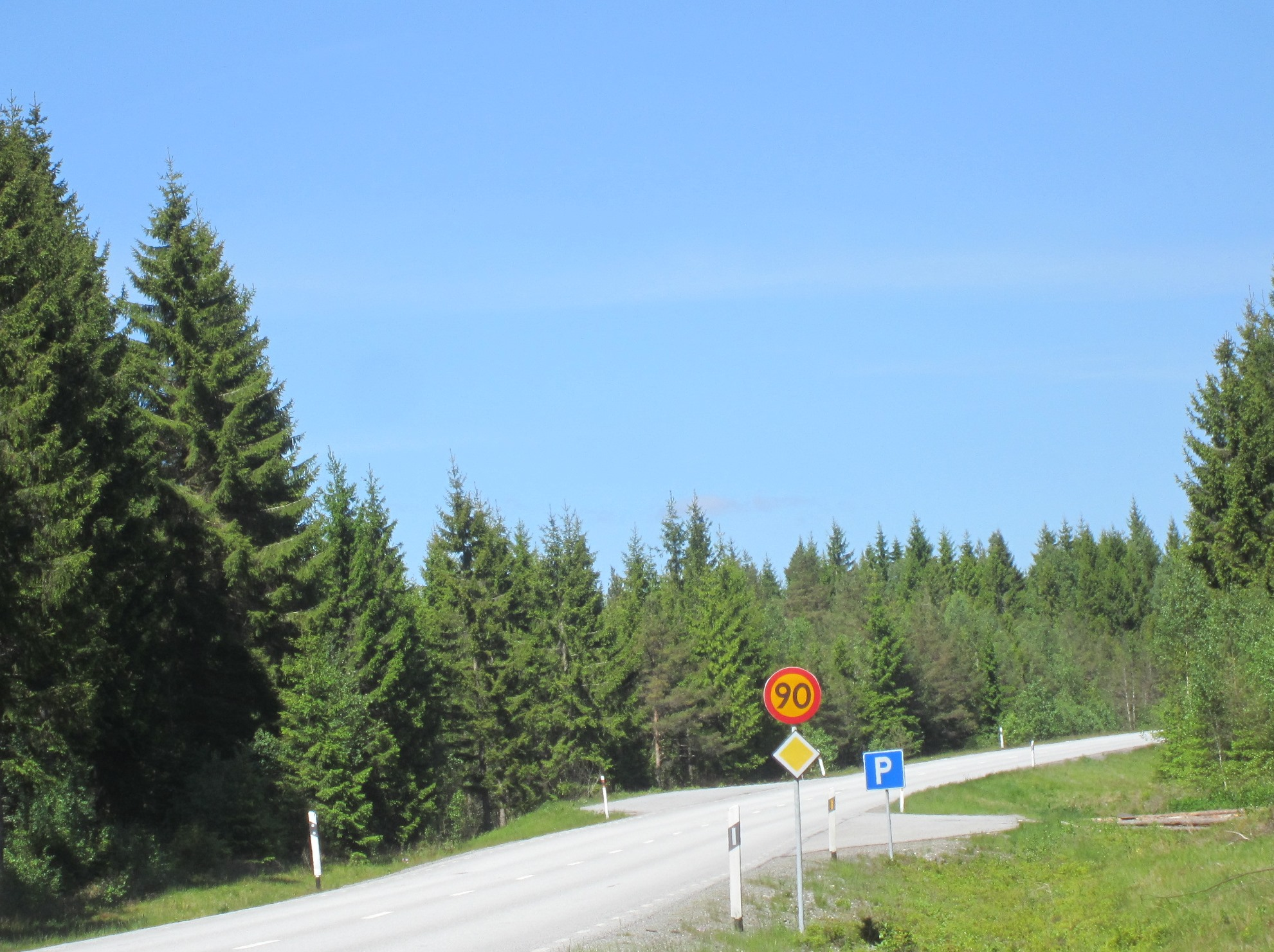 Länsväg 164 nær Fagerhult kapell